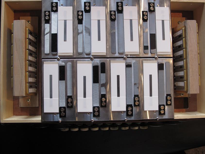 Bassstimmplatteneinbau abweichend erfordert ein breiteres Gehäuse